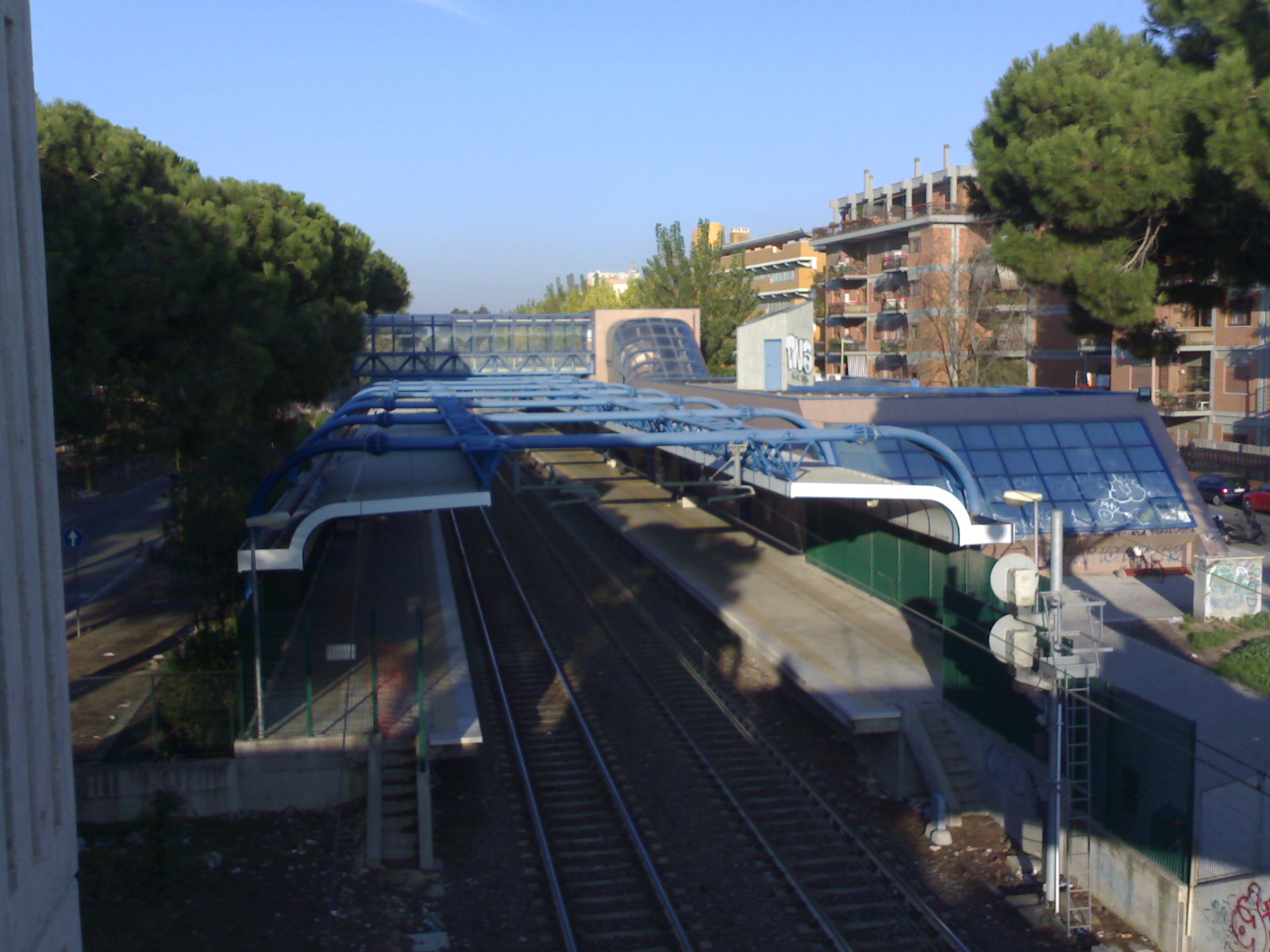 L'autore di questa foto è Daniele Schirmo aka Template:Utente:Frankie688/Firma e la rilascia con la seguente licenza